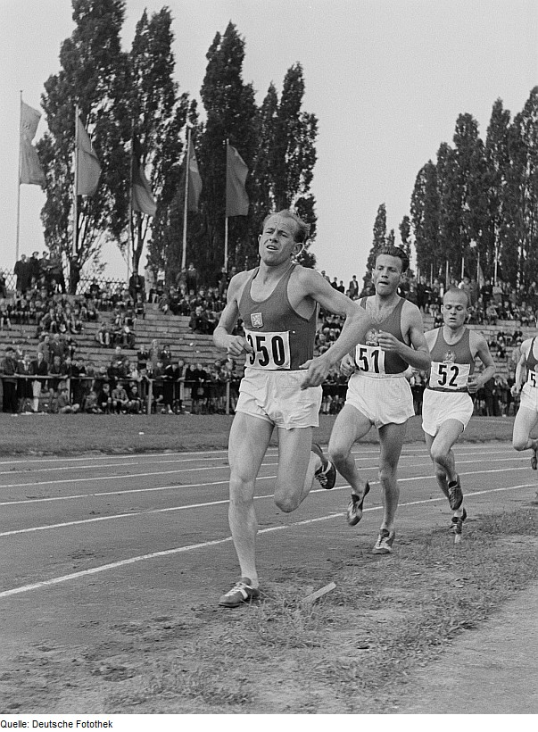 Original image description from the Deutsche FotothekEmil Zátopek bei einem Wettkampf